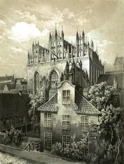 Die St. Trinitatis-Kirche mit der St. Annen-Kirche, Abb in Rudolph Genée: Danziger Bauwerke in Zeichnungen von Julius Greth